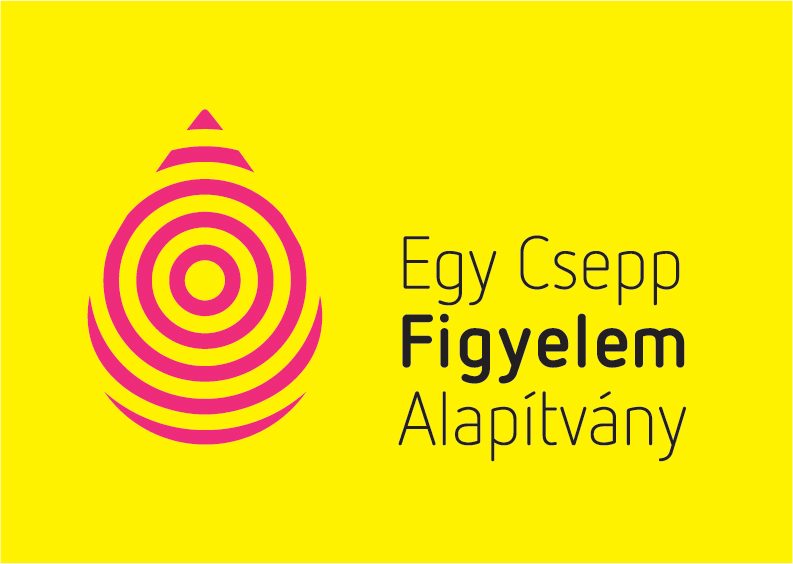 Az Egy Csepp Figyelem Alapítvány logója